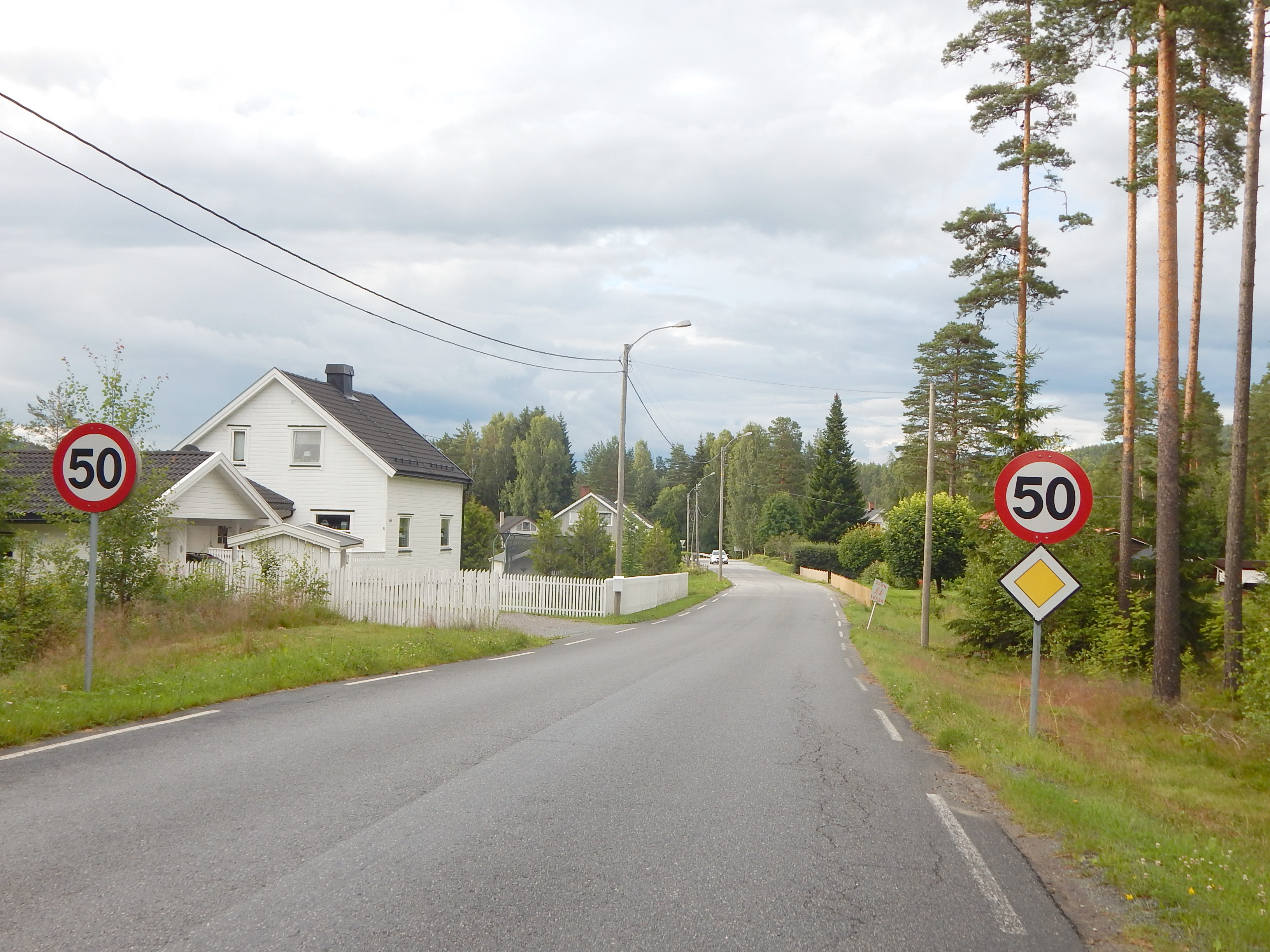 Granlivegen (fylkesvei 367) på Granli